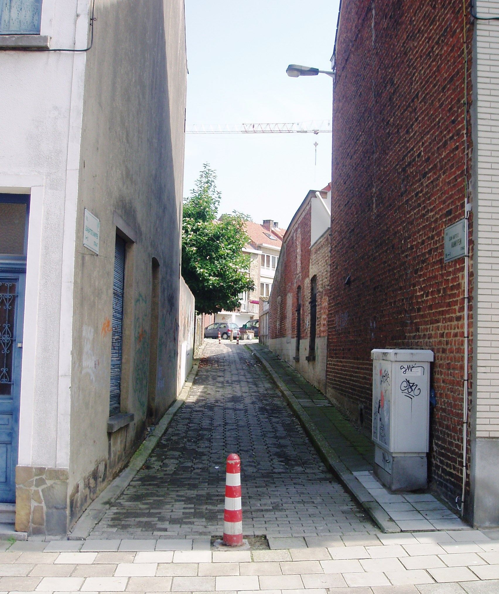 Rue Jean-Baptiste Vannypen Auderghem Belgium